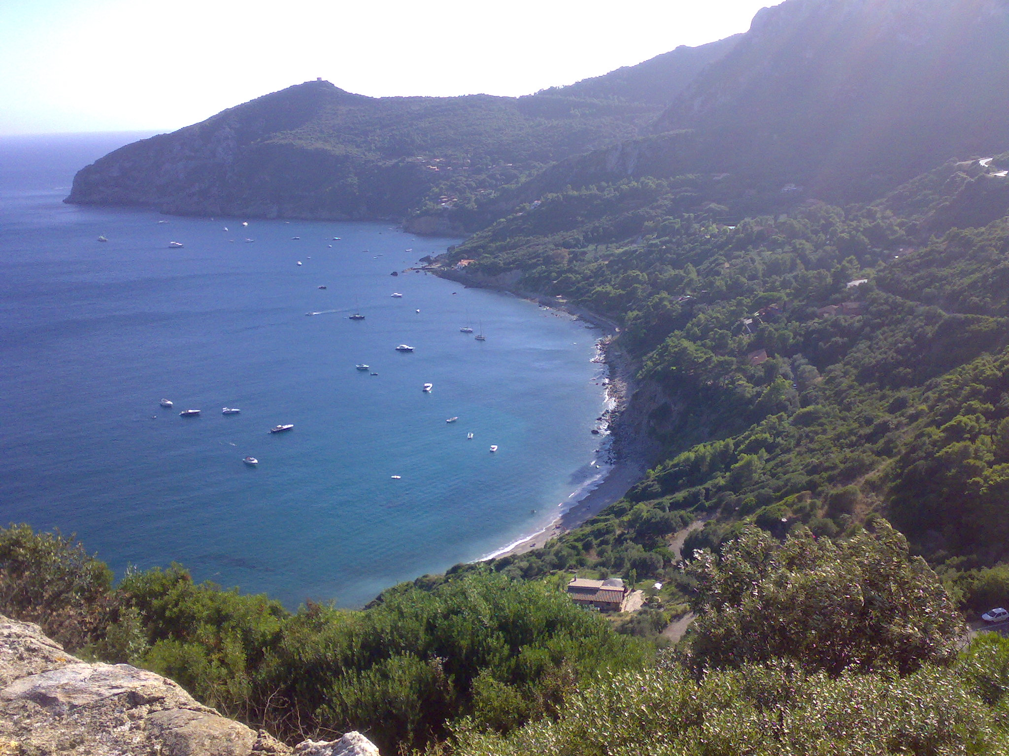 Costa dell'Argentario presso Porto Ercole fino a punta avoltore.